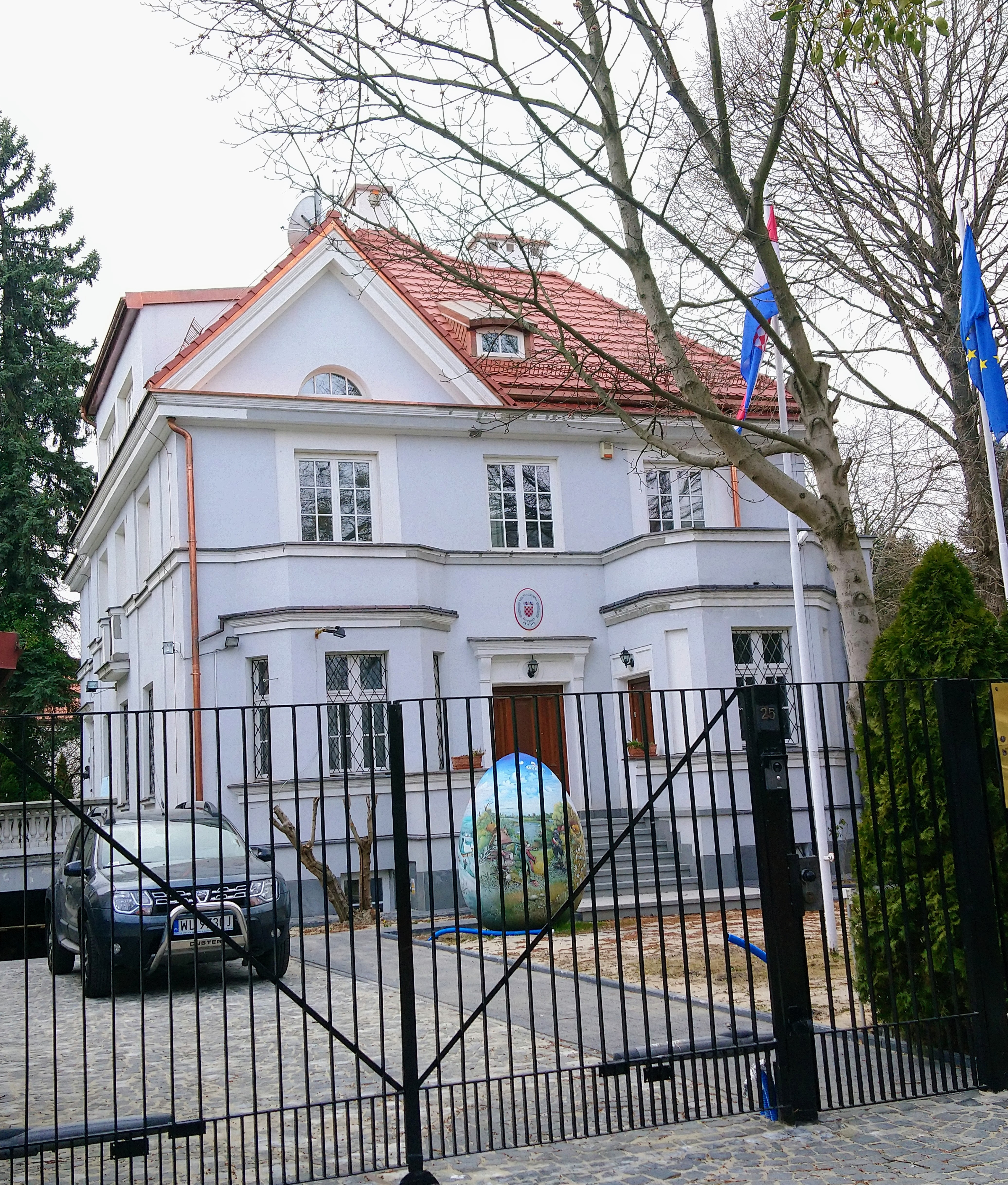 Ambasada Chorwacji